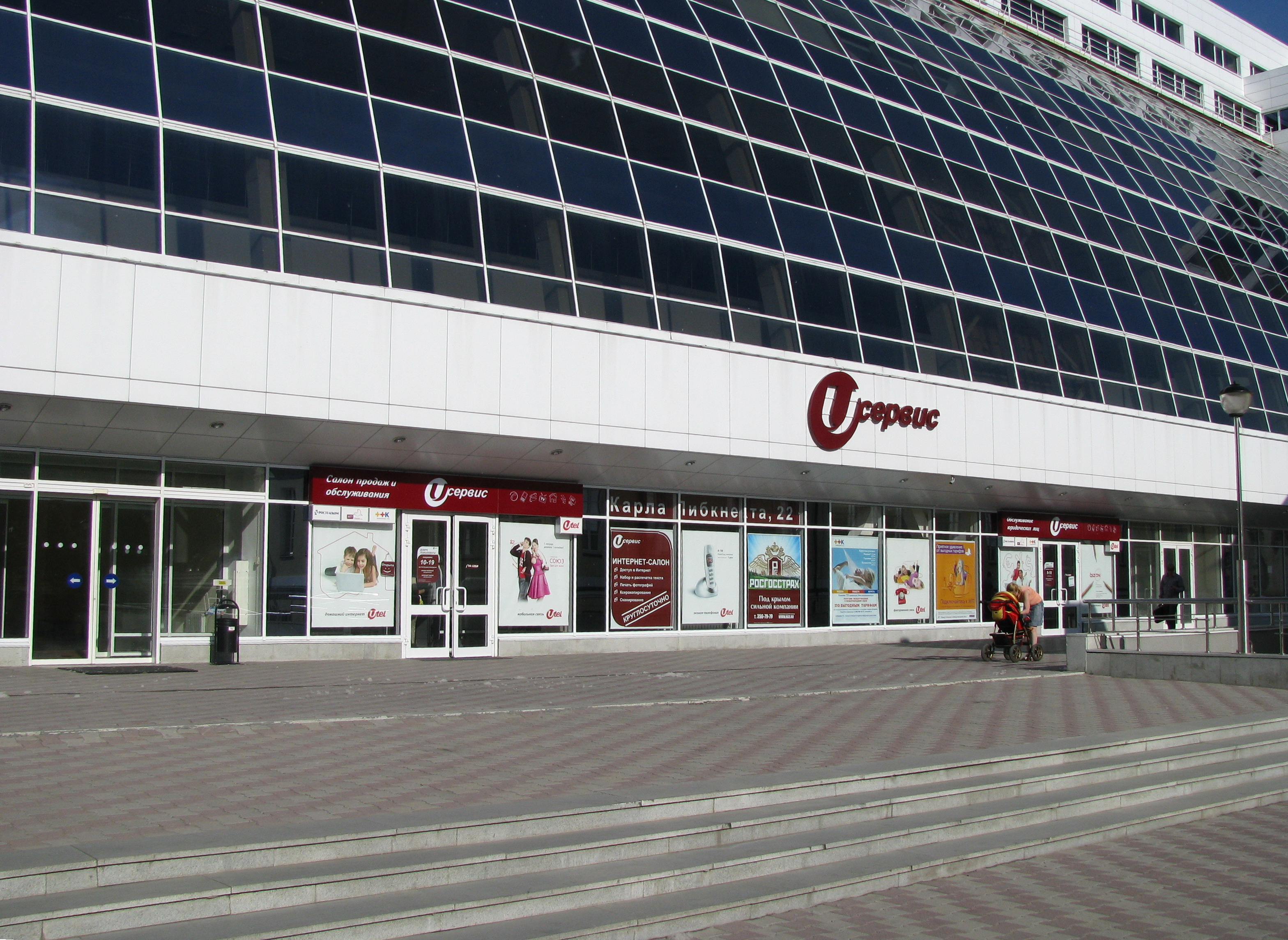 сервисный центр для абонентов Utel (УралСвязьИнформ) в Екатеринбурге